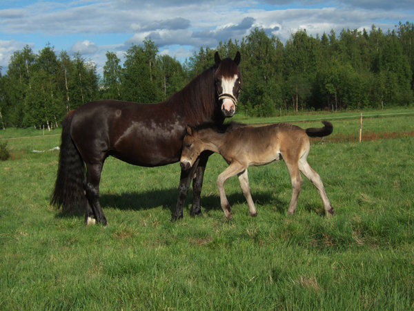 Kallblodig travare med föl